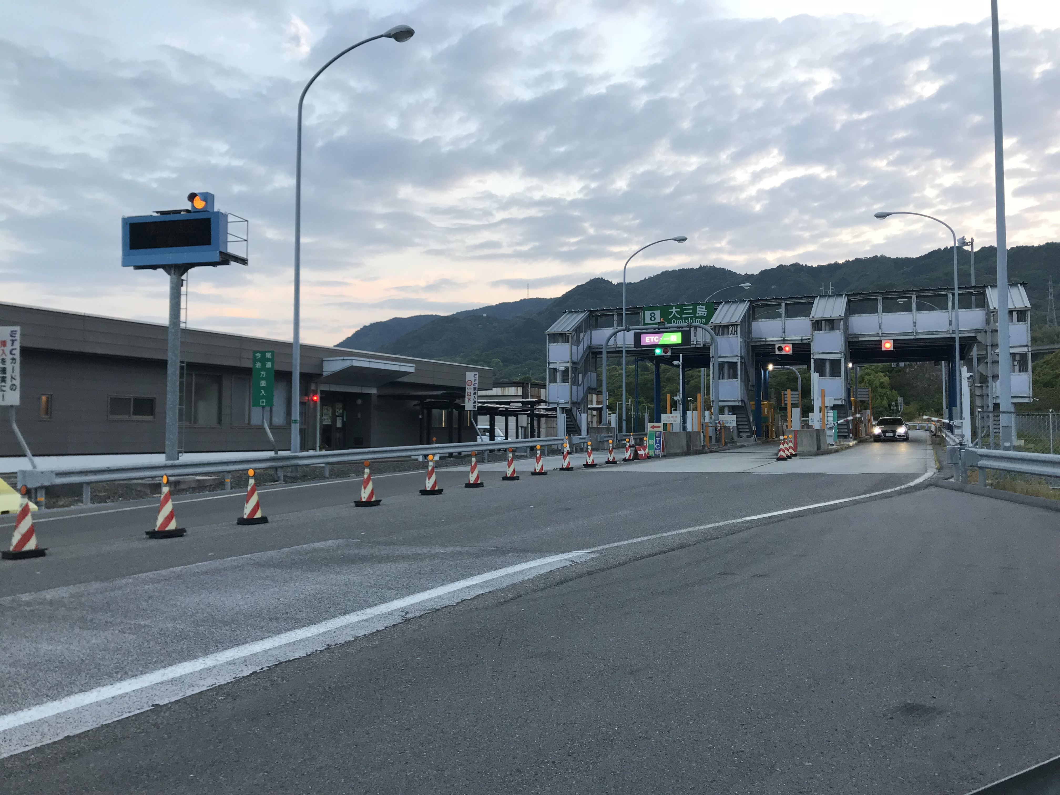 しまなみ海道・大三島ICの料金所